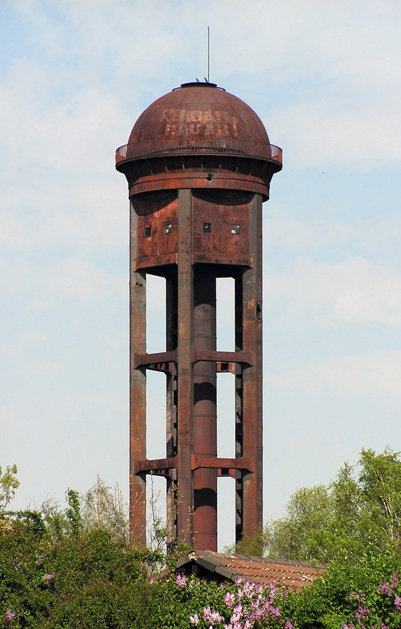 Wasserturm Rangierbahnhof Tempelhof, heute im Naturpark Südgelände